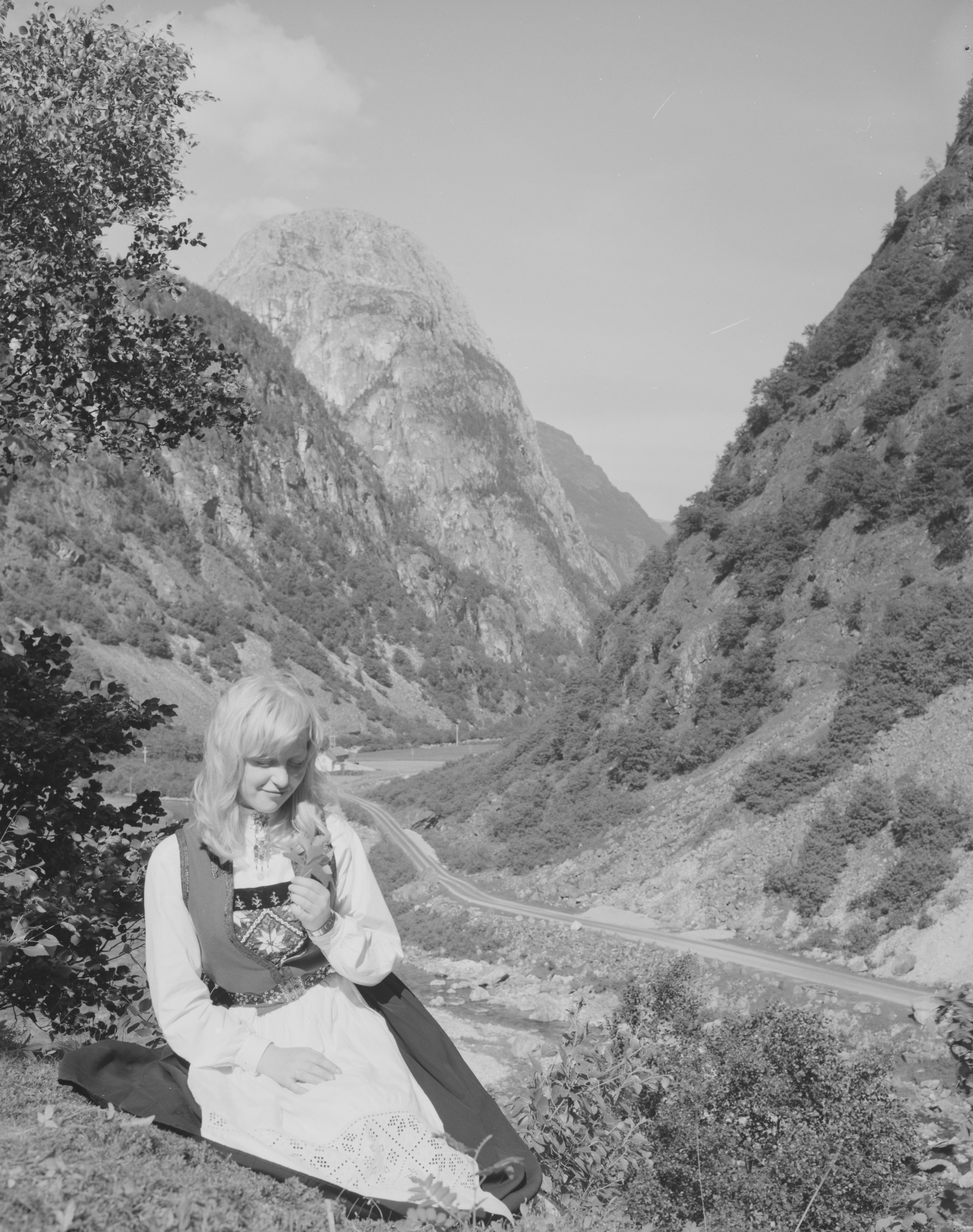 Bildet er hentet fra Nasjonalbibliotekets bildesamling. Anmerkninger til bildet var: Fotograf: ÅM Nærøydalen, Voss, Hordaland